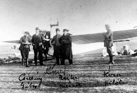 Nemrég előkerült kép Kvasz András Kvasz II. repülőgépéről.